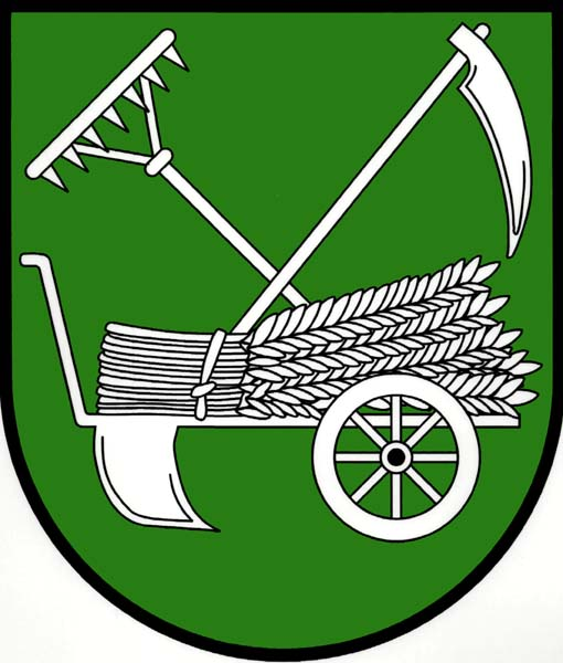 Znak obce Semčice